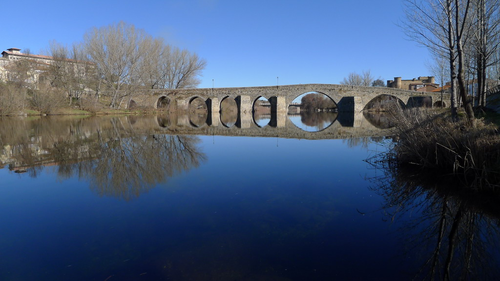 Puente de El Barco de Ávila